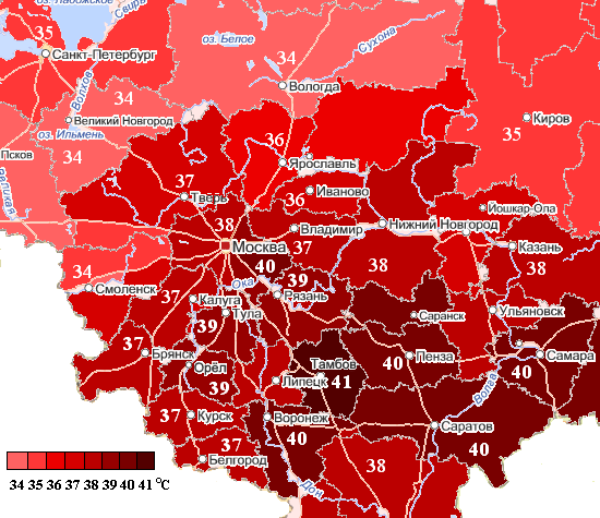 Отредактированный ЦФО.png. Исправлены ошибки территориального деления, обновлены данные, добавлены подписи.